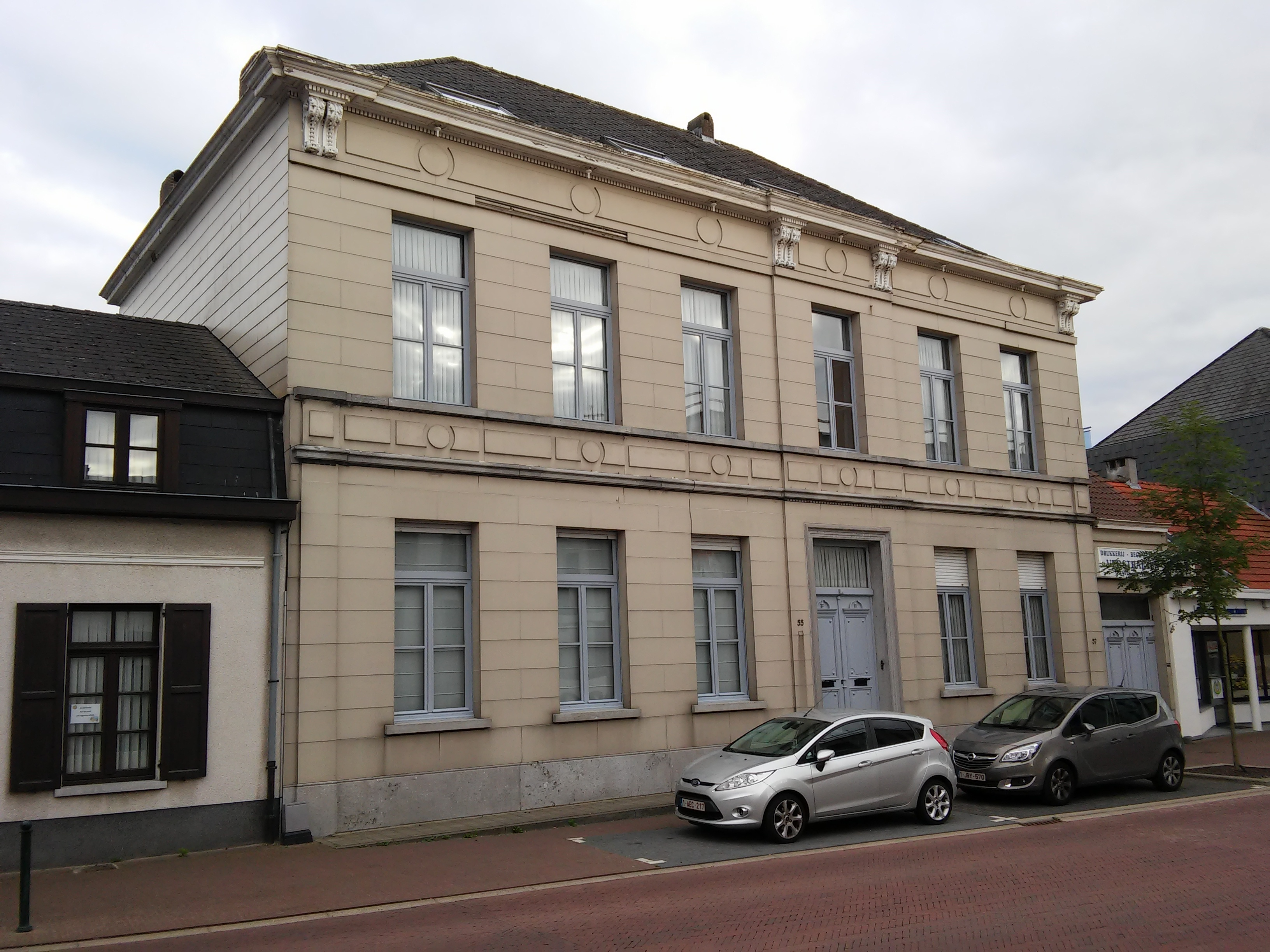 Neoclassicistische woning, Ruisbroek-Dorp 55, Ruisbroek